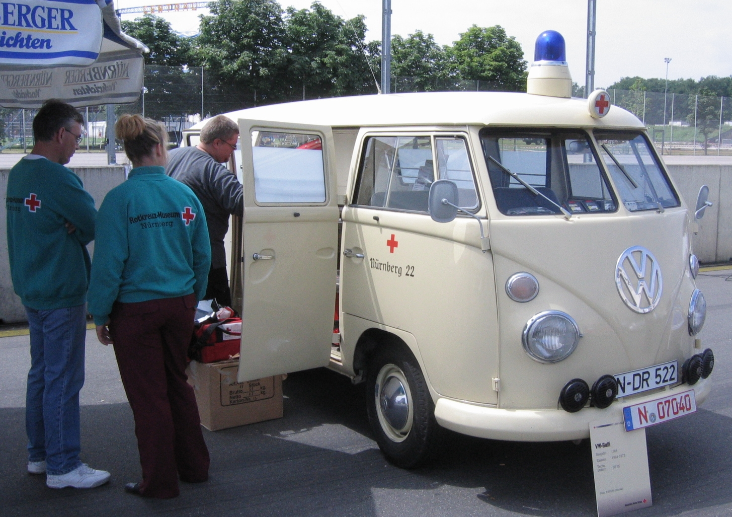 Rettungswagen, heute im Besitz des Rotkreuz-Museum Nürnberg, aufgenommen beim "Einsatz" am Nürnberger Käfertreffen.